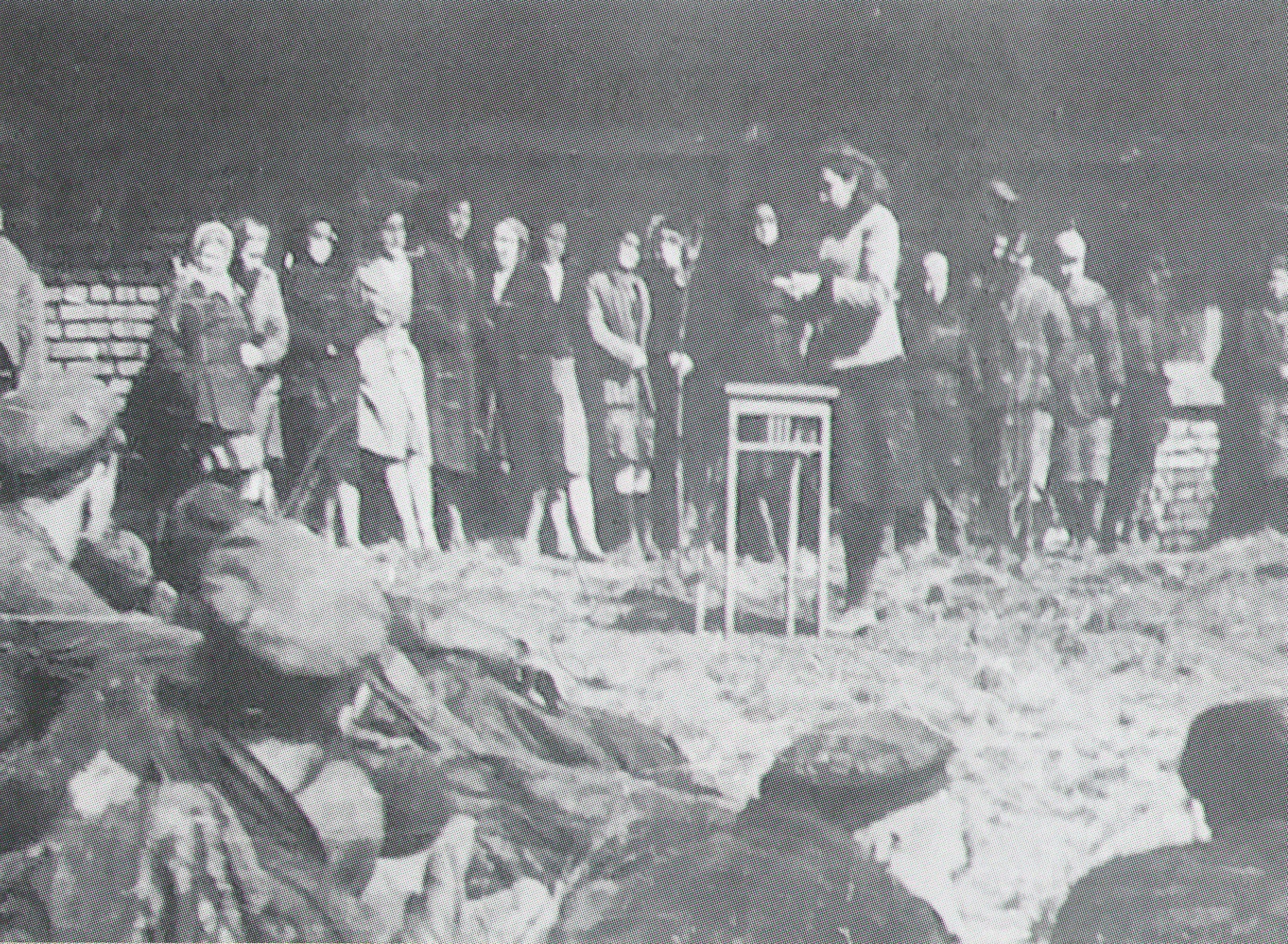 СУМЗ. Политинформация 1942